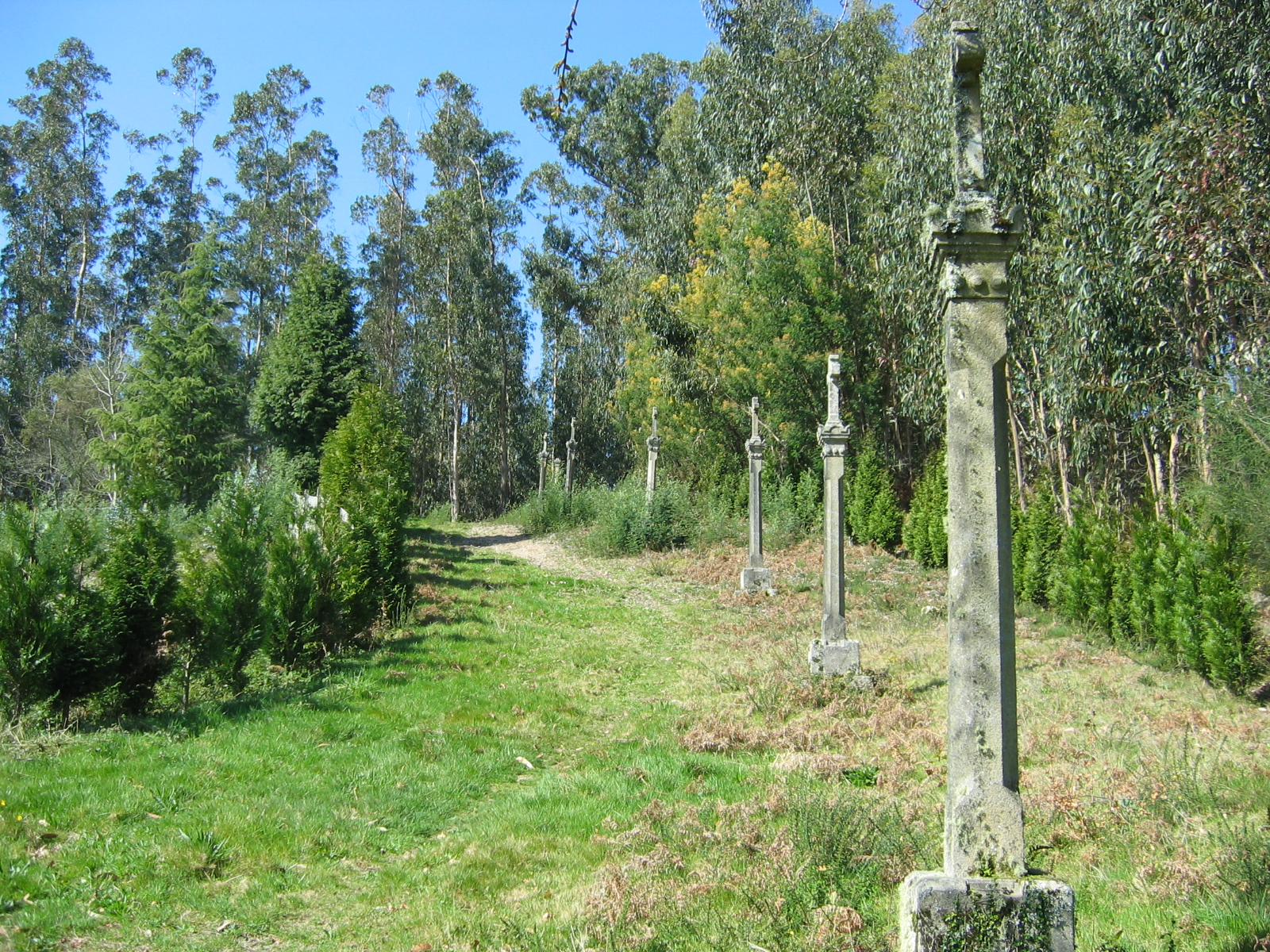 Primeiras estacións do Viacrucis do Casal, Estacas, Cuntis.